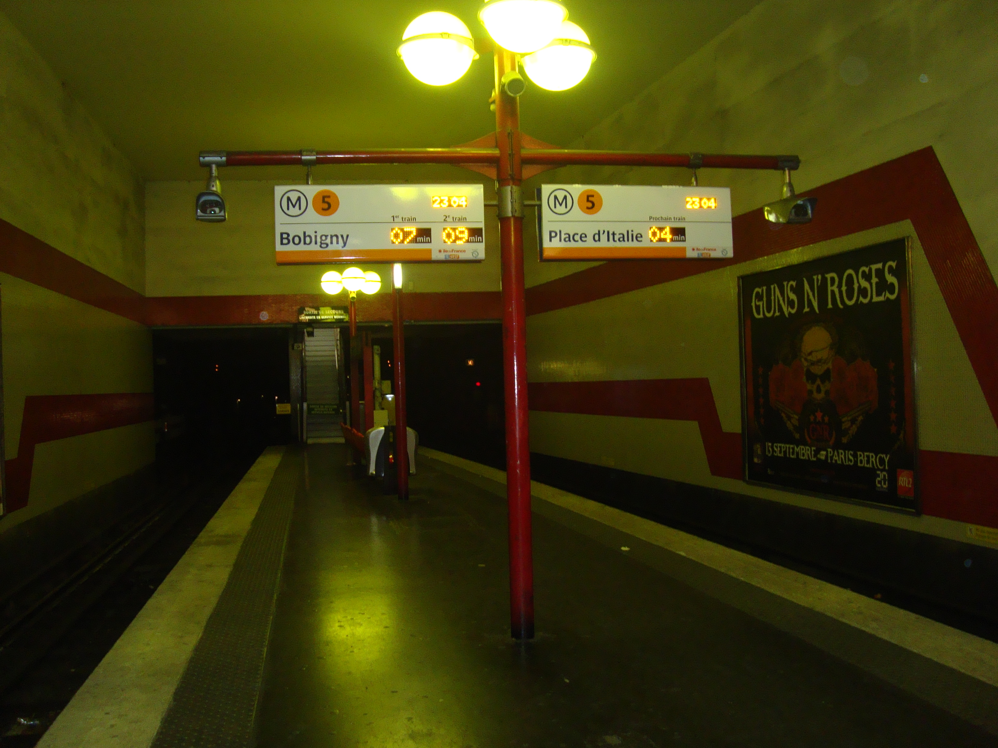 Le quai central de la station de métro de ligne 5 Bobigny - Pantin - Raymond Queneau.